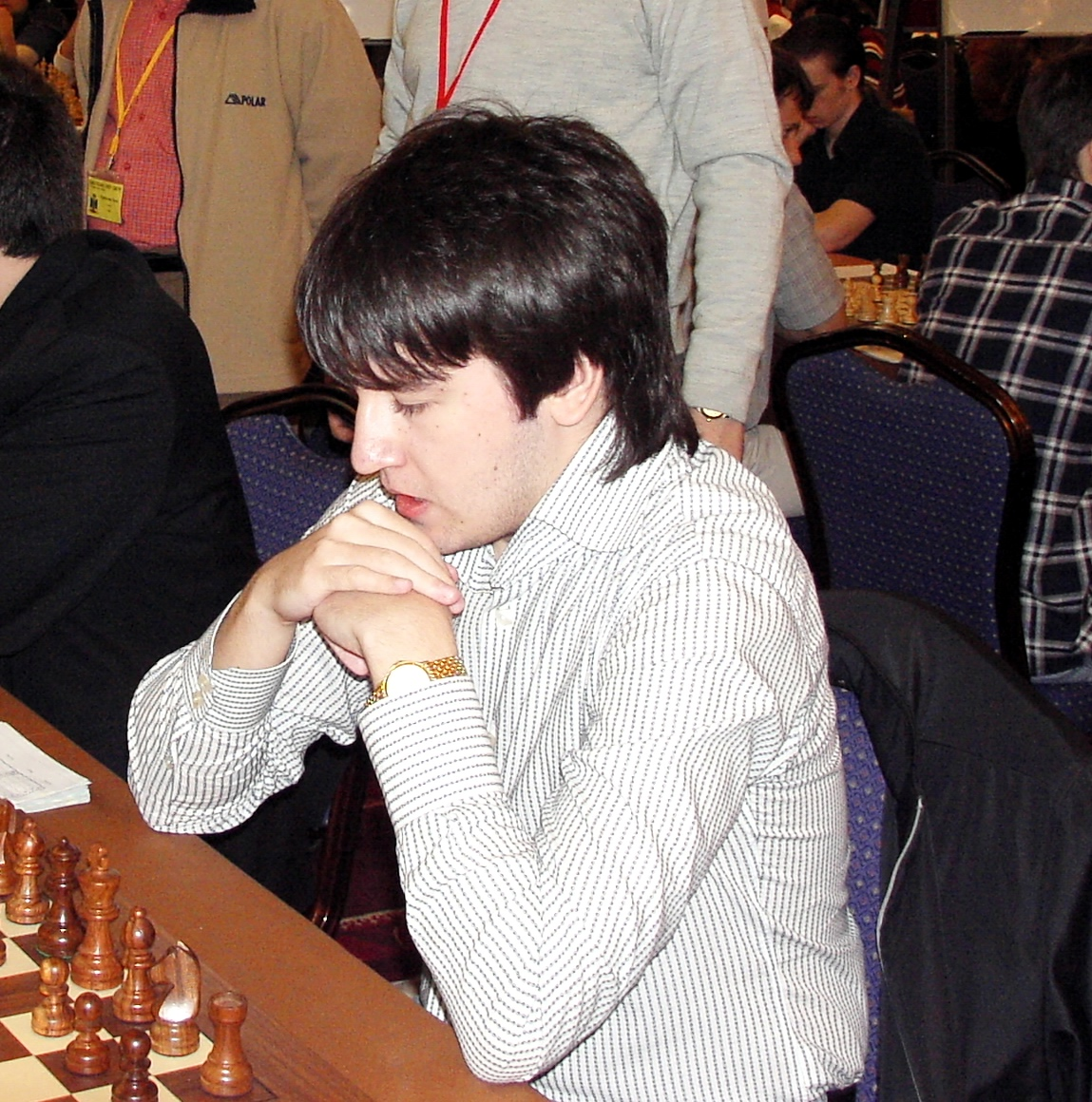 GM Teimour Radjabov (AZE), EuroChess Iraklion 2007